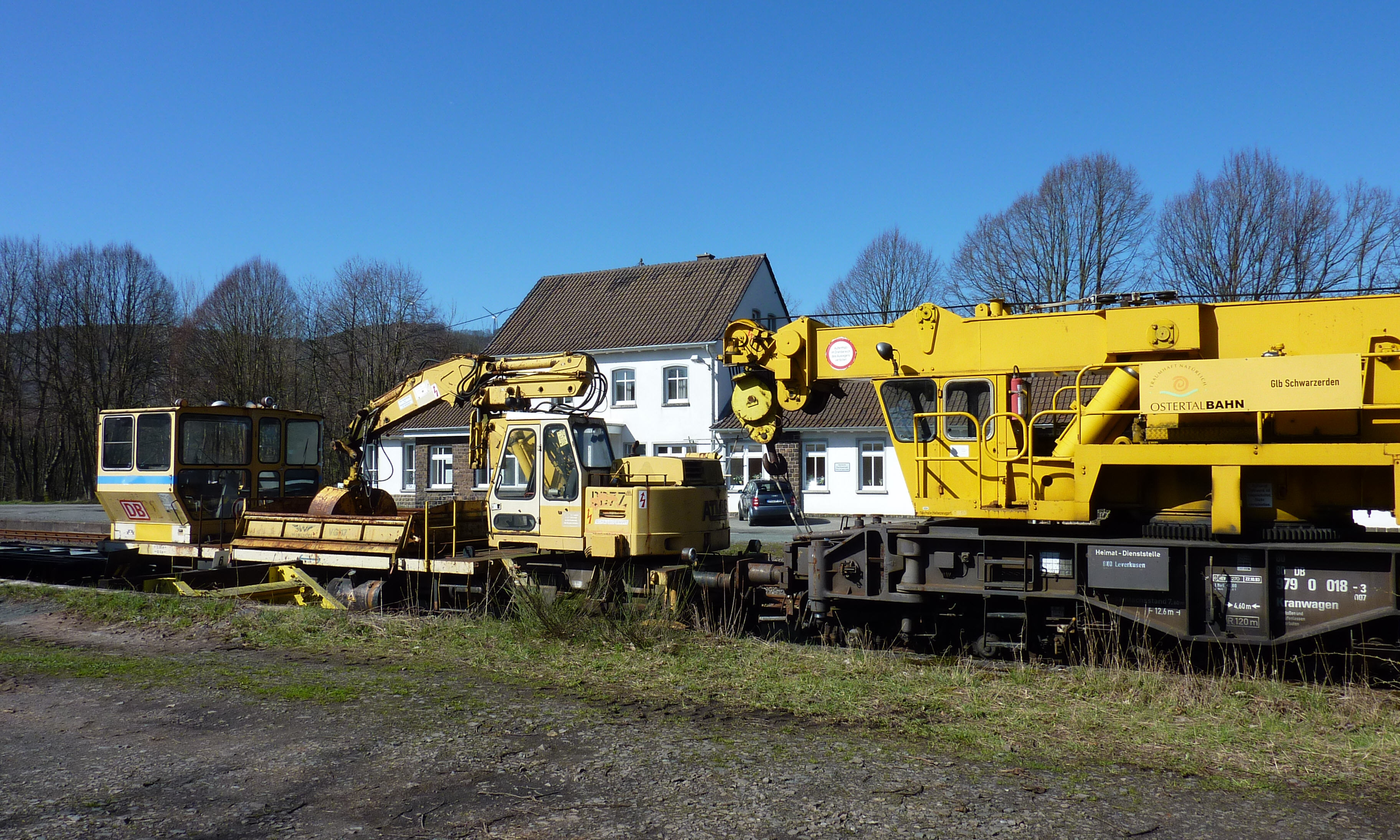 Bahnhof Schwarzerden